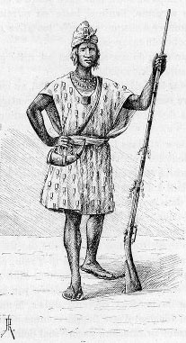 Guerrier et chasseur malinké du Haut-Niger (illustration de Côte occidentale d'Afrique du Colonel Frey, Fig.14 p.28)